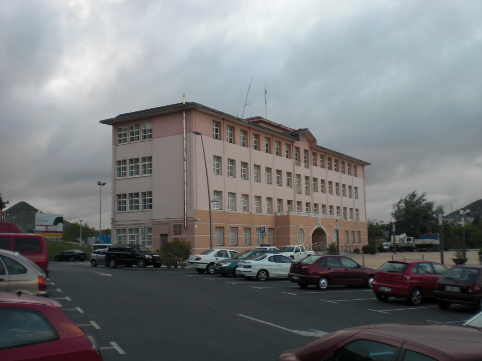 Abanto-Zierbenako udaletxea, Gallartan.